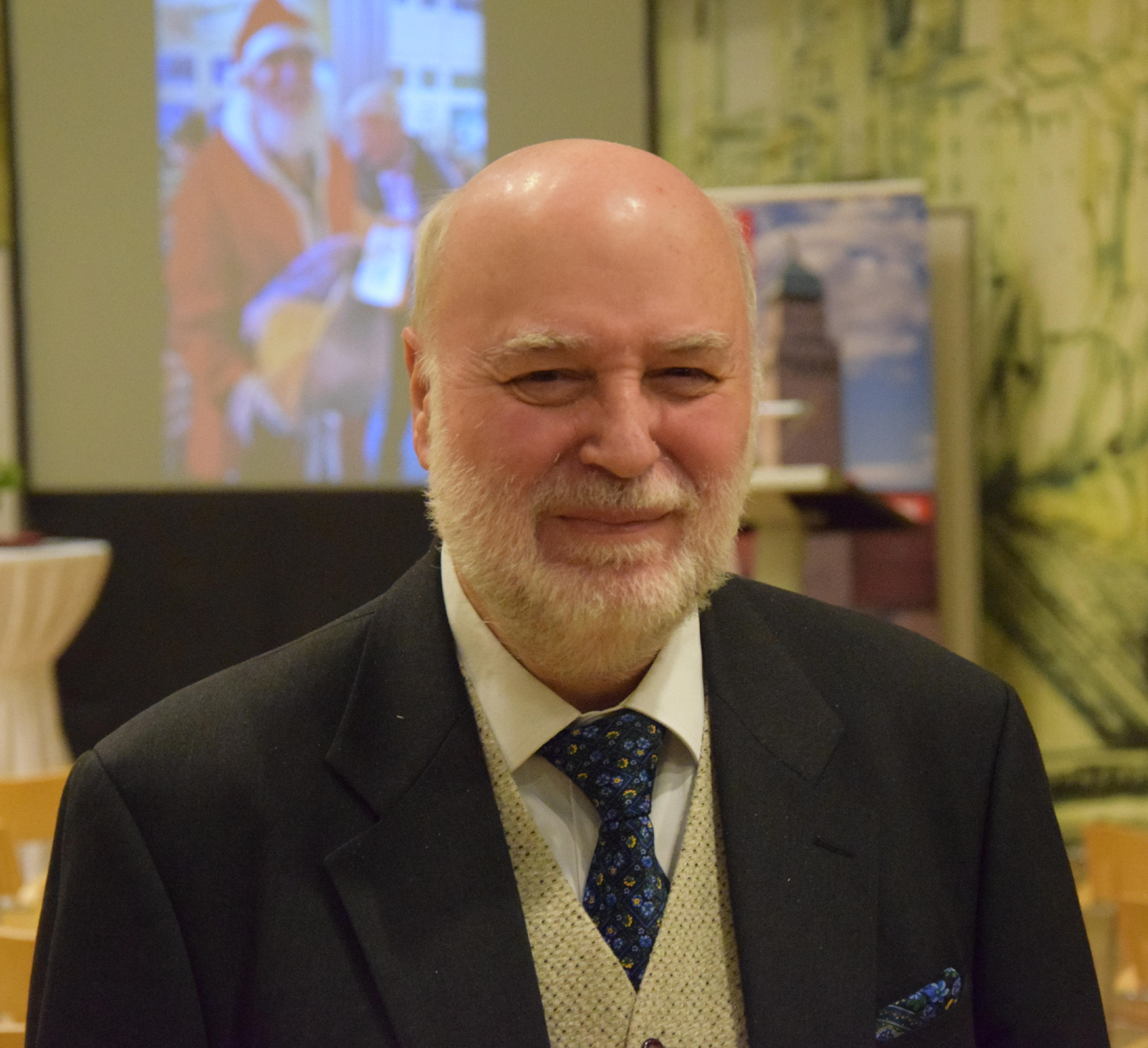 Bodo Manegold, deutscher Politiker (CDU), Bezirksbürgermeister von Berlin-Neukölln von 1995 bis 2001